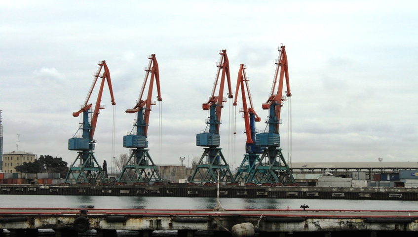 Порт в Баку